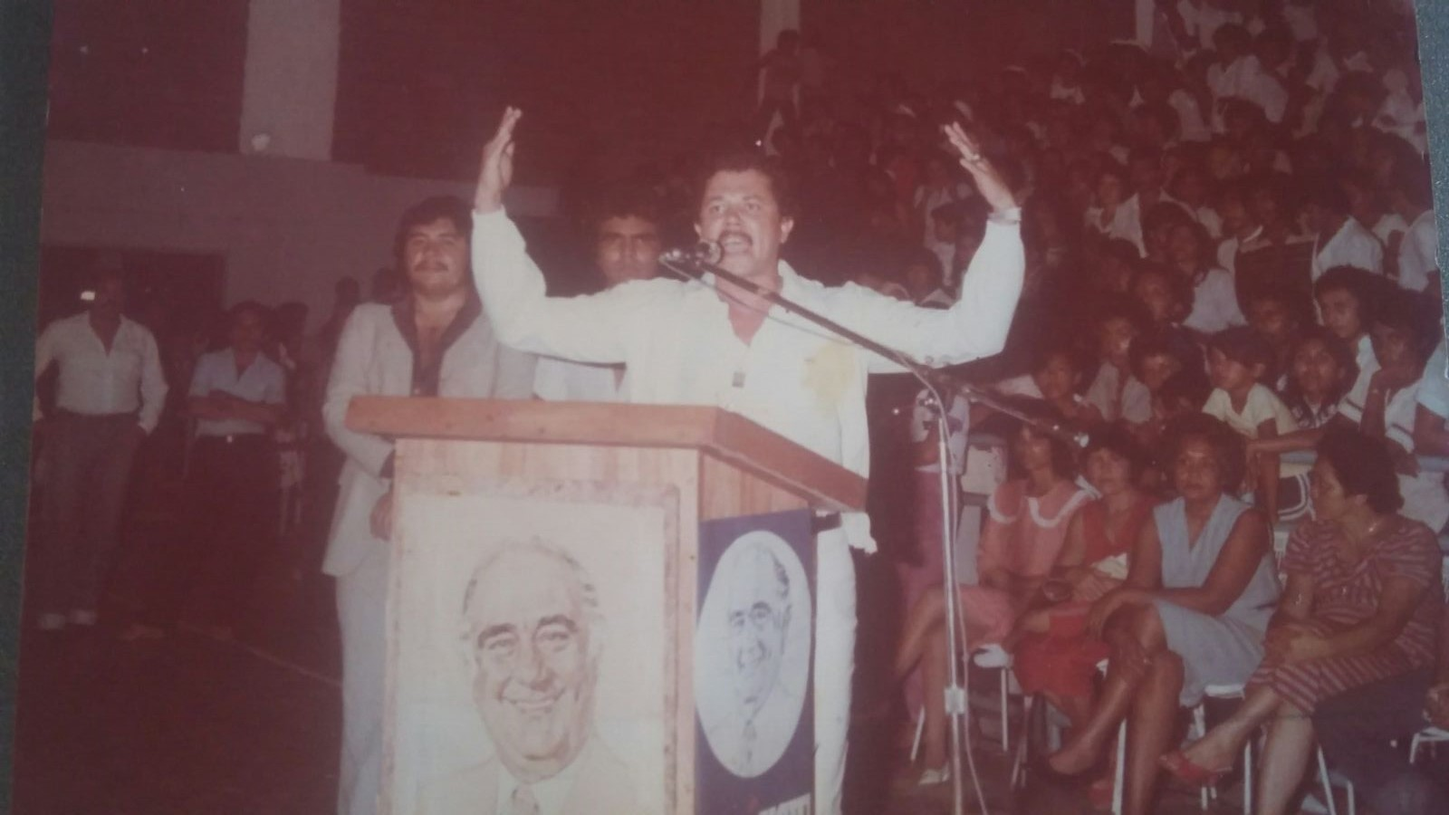 El candidato a las elecciones del Municipio Villa Bruzual / Capital Turen por Acción Democrática Francisco Mendoza en Jornadas con Jaime Lusinchi.